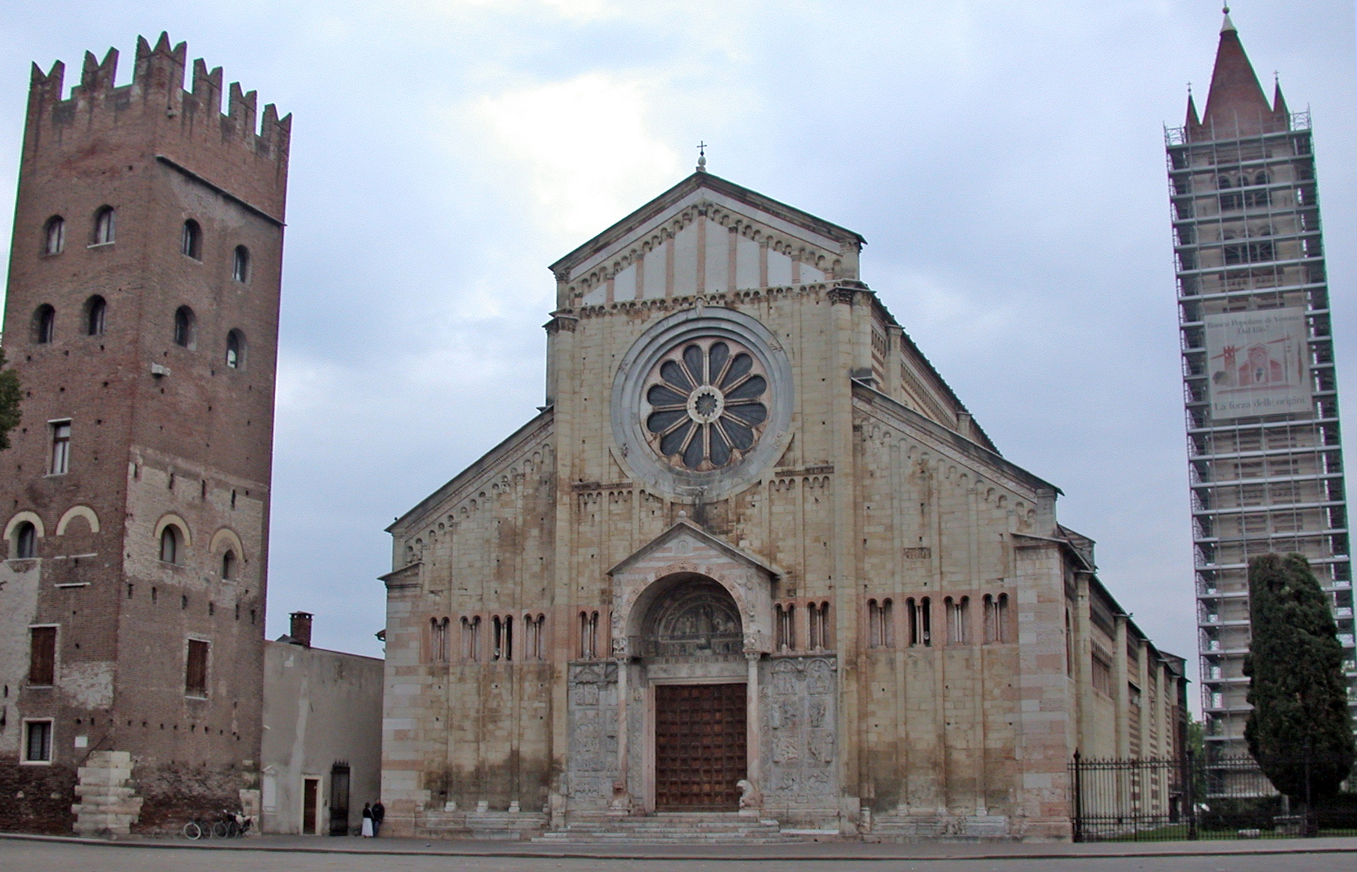 Verona, church of San Zeno Maggiore